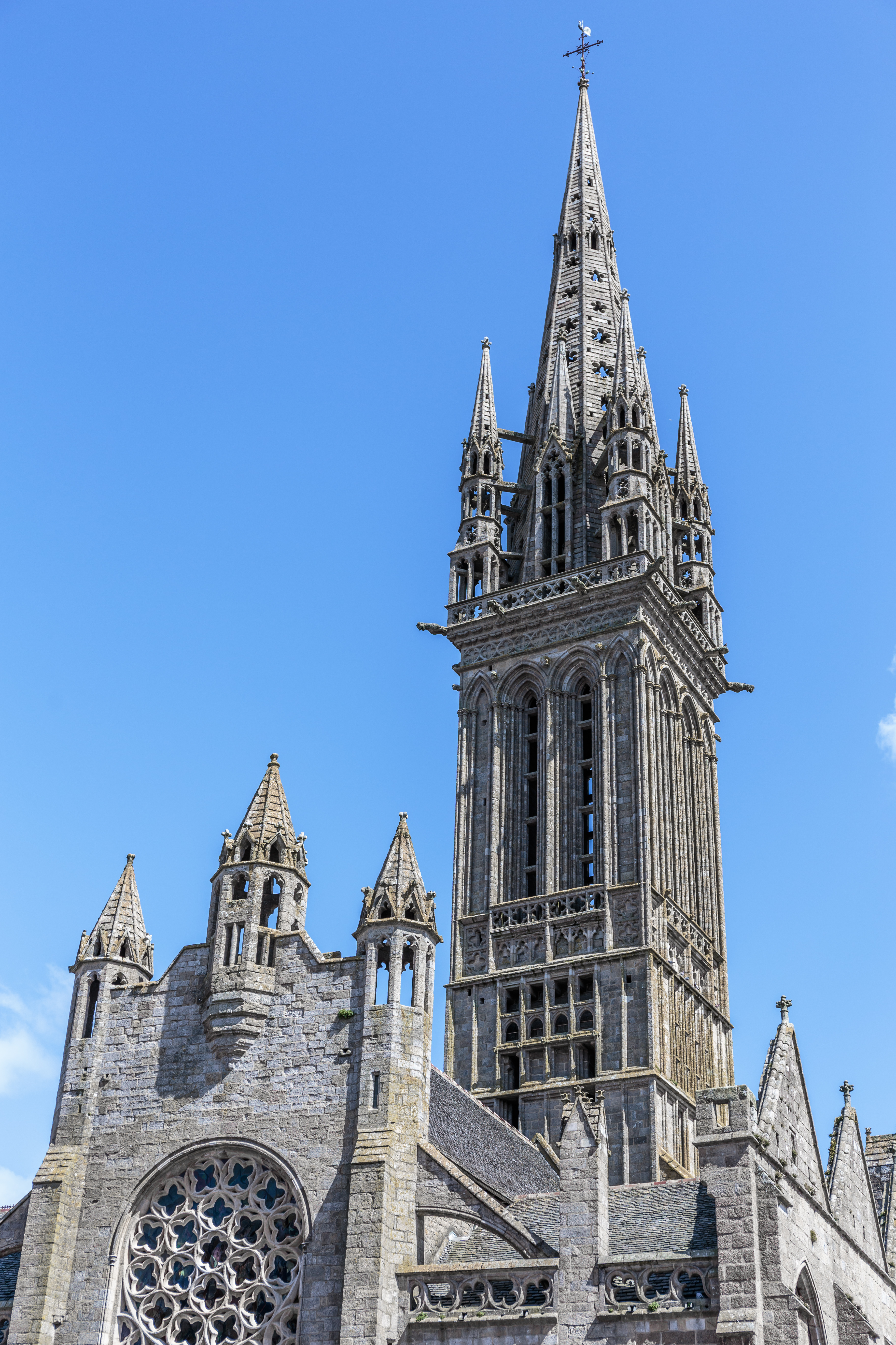 Côté Ouest de la chapelle du Kreisker à Saint-Pol-de-Léon (Finistère, Bretagne).